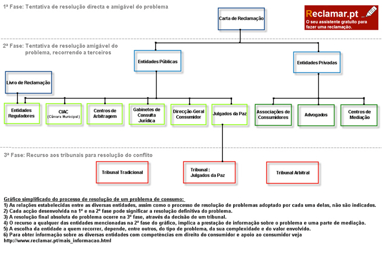 Gráfico simplificado do processo de resolução de um problema de consumo, com referências às diversas entidades competentes.